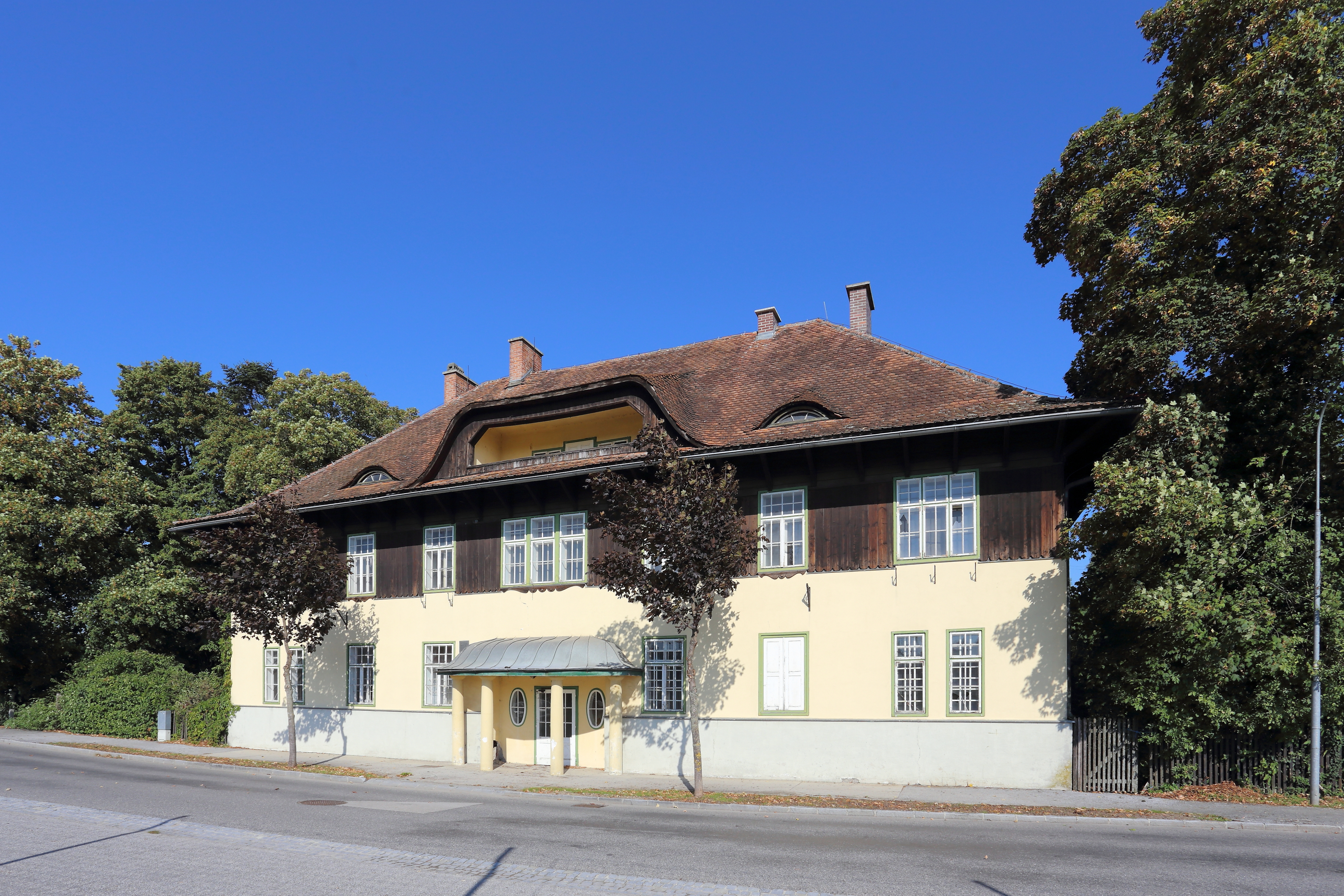 Wohnhaus an der Breiteneicher Straße 5 in der niederösterreichischen Stadt Wieselburg. Ein zweigeschossier Holzriegelbau aus dem Jahr 1915 auf gemautertem Sockel. Im 1. Weltkrieg diente das Bauwerk als Kommando- bzw. Hauptgebäude des Kriegsgefangenenlager Wieselburg.